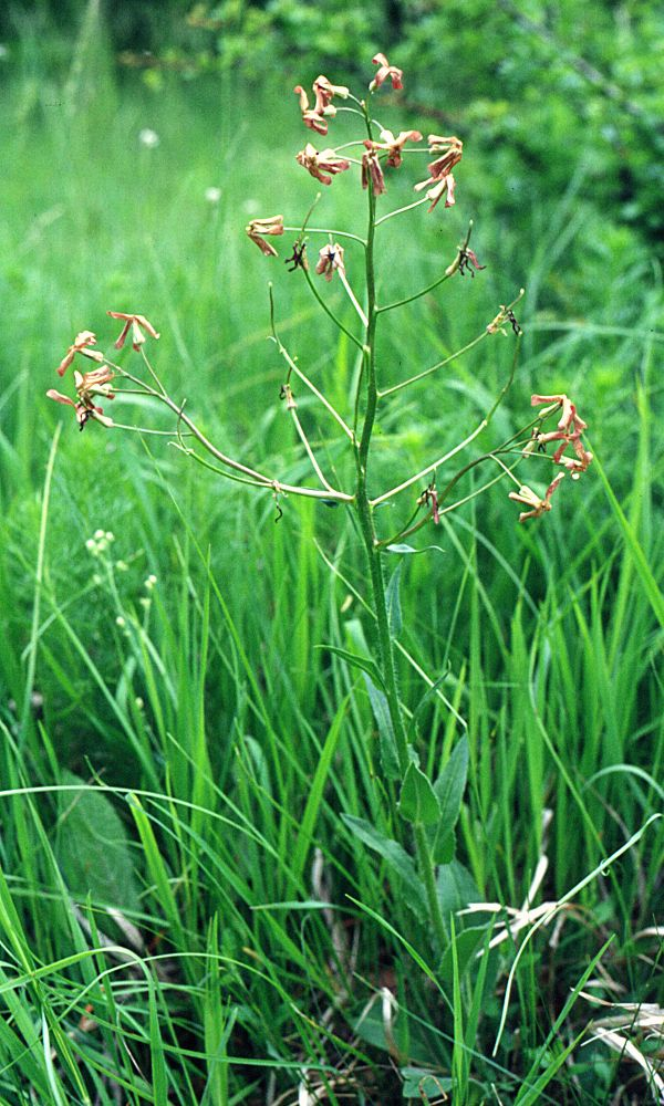 Trauer-Nachtviole (Hesperis tristis), Kreuzblütler (Brassicaceae) - Österreich/Austria/Autriche: Niederösterreich, Weinviertel, Steinbergwald bei Zistersdorf, Trockenrasen